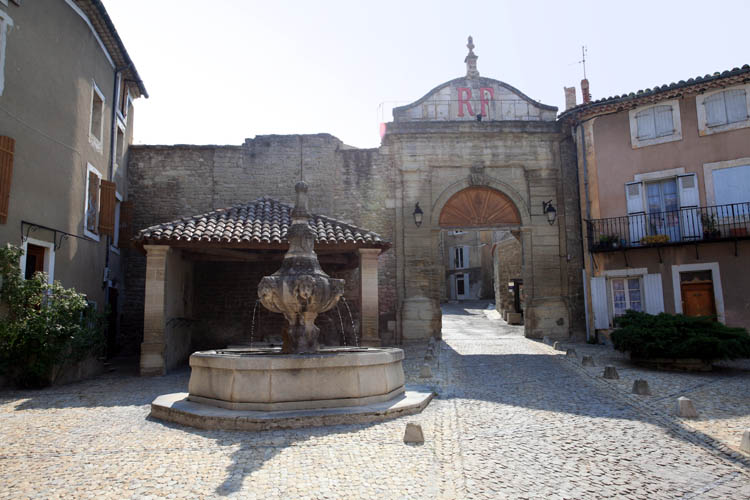 Malemort-du-Comtat in Vaucluse, France